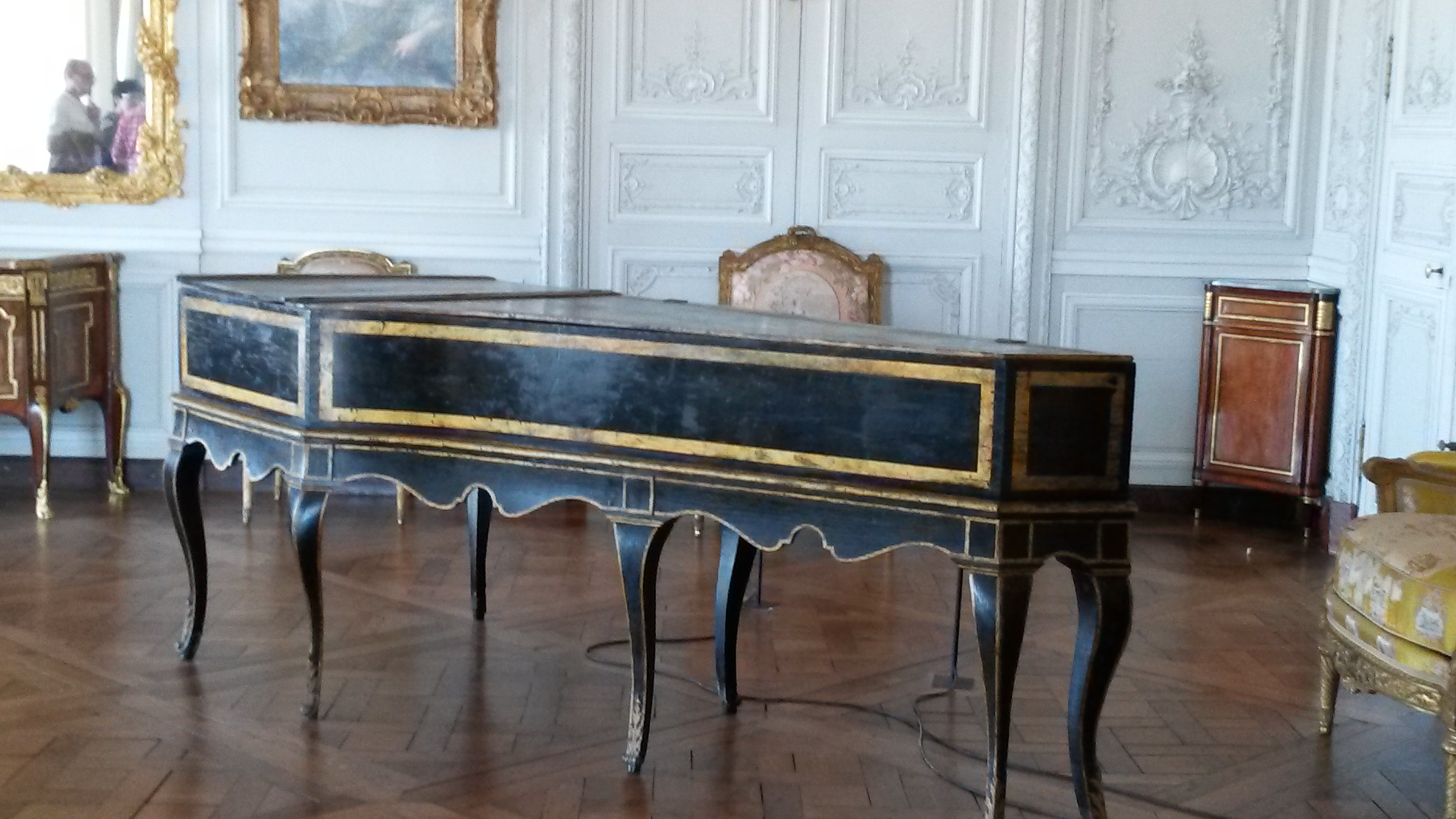 Le grand cabinet de Madame Victoire, Clavecin blanchet (Chateau de Versailles).